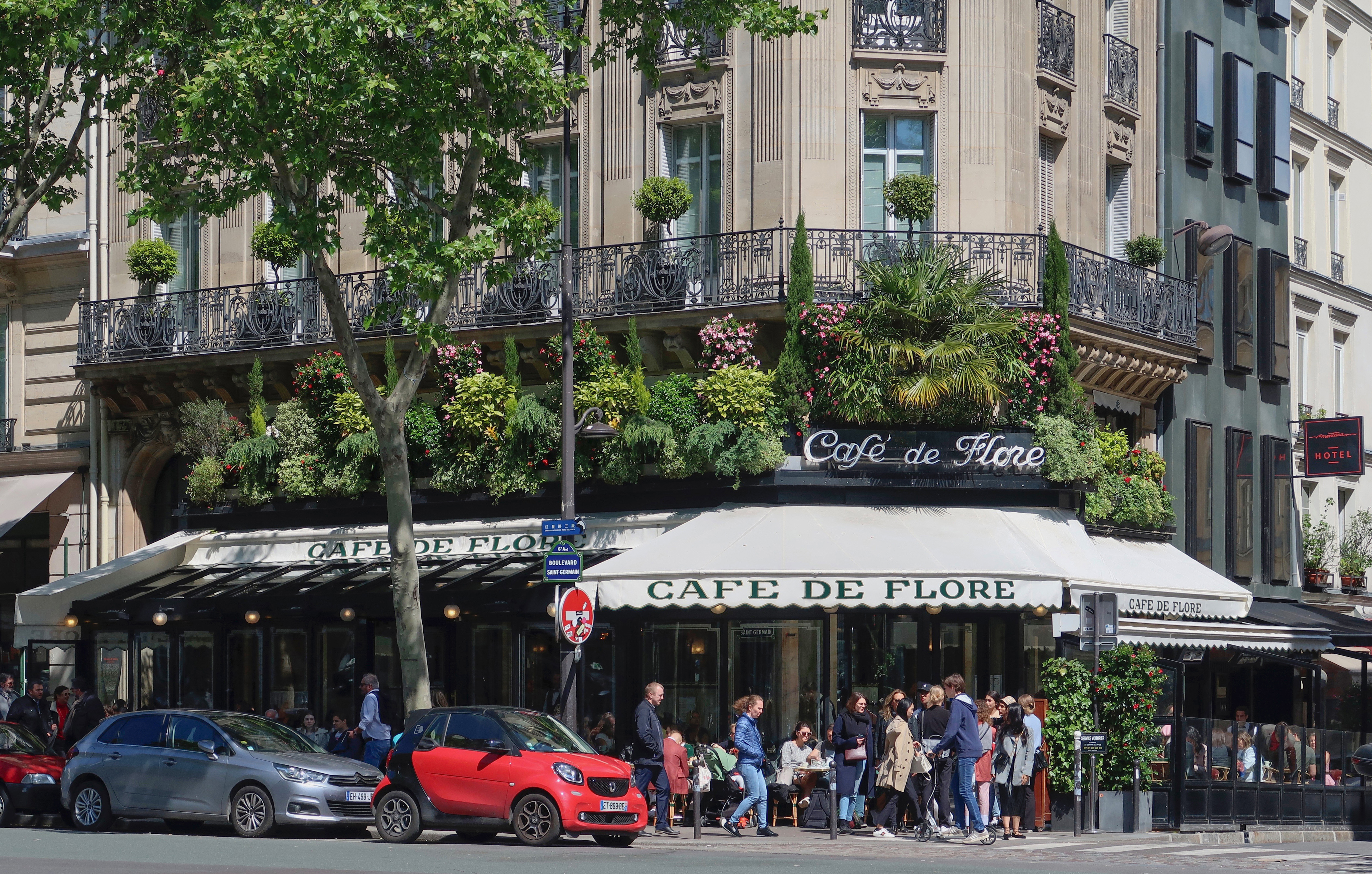 Café de Flore, 172 boulevard Saint-Germain (Paris, 6e).